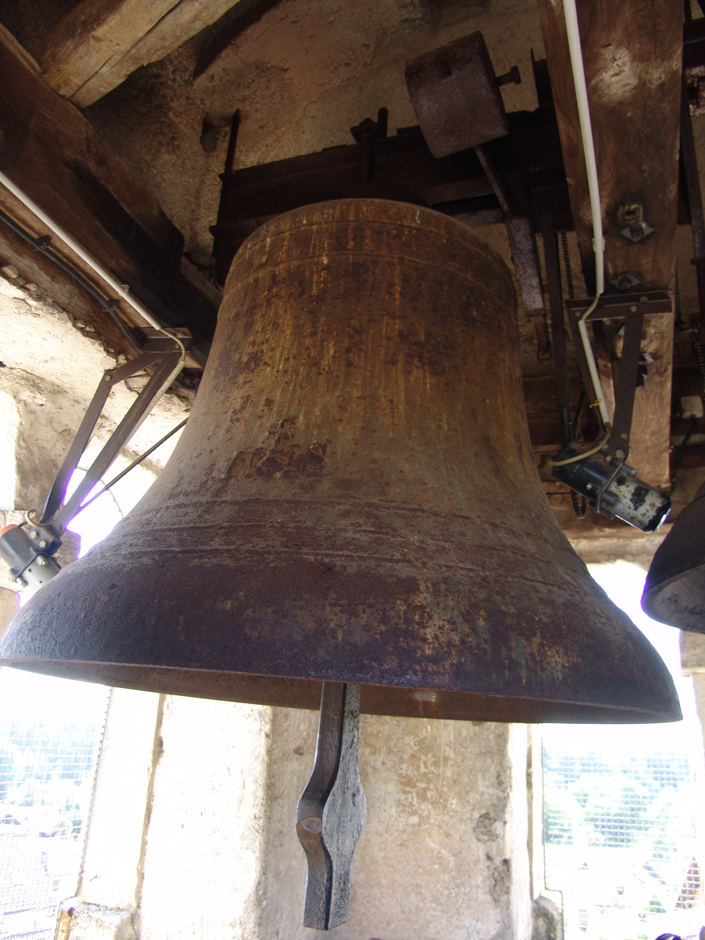 Glavni (veliki) zvon